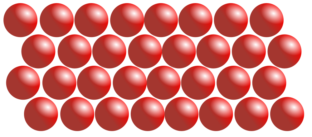 solid model